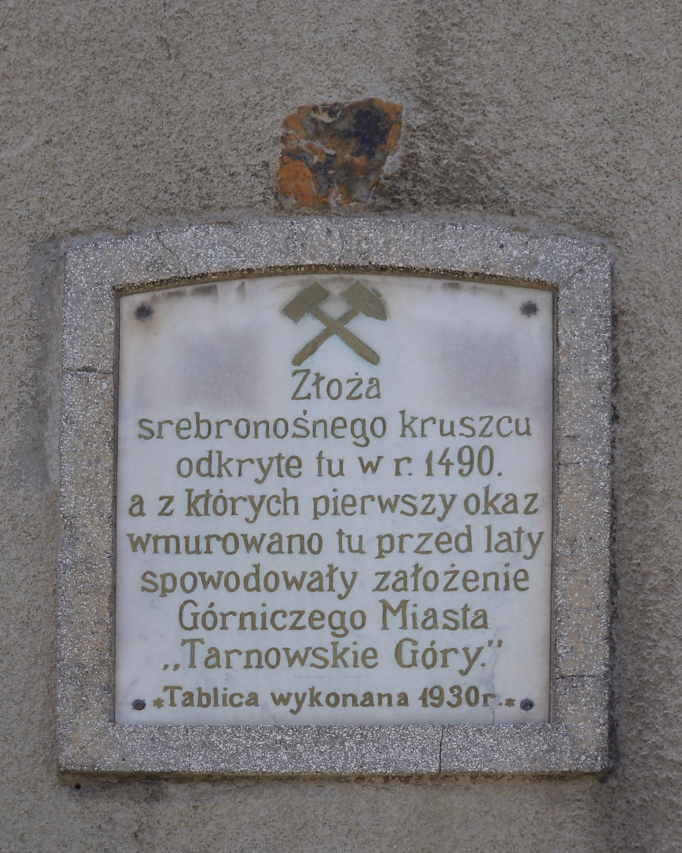 Tablica pamiątkowa na fasadzie budynku przy ul. Gliwickiej 6 w Tarn. Górach